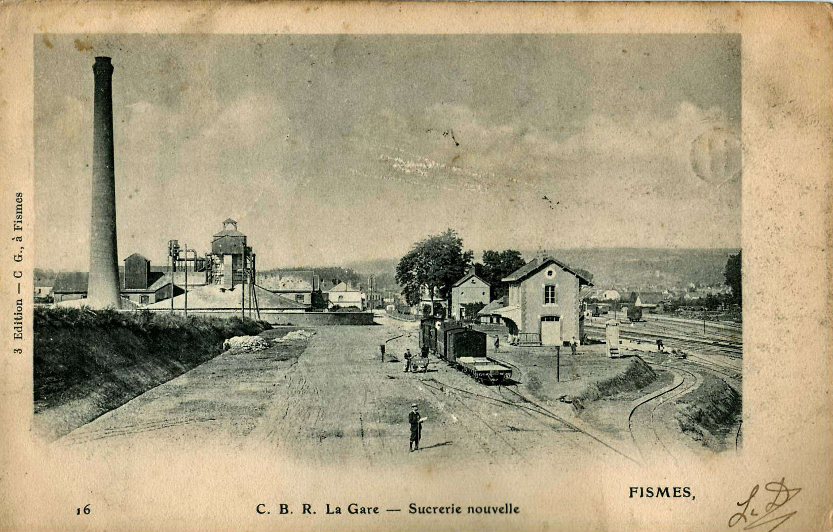 Carte postale ancienne éditée par GC à Fismes, N°16FISMES : Chemin de fer de la banlieue de Reims : La Gare - Sucrerie nouvelle